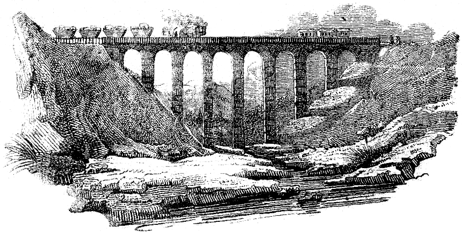 Immagine dalla rivista Cosmorama Pittorico, Milano, 1836 - nr. 15. Punte Del Soiron lungo la strada di ferro da Sant Etienne a Lione.